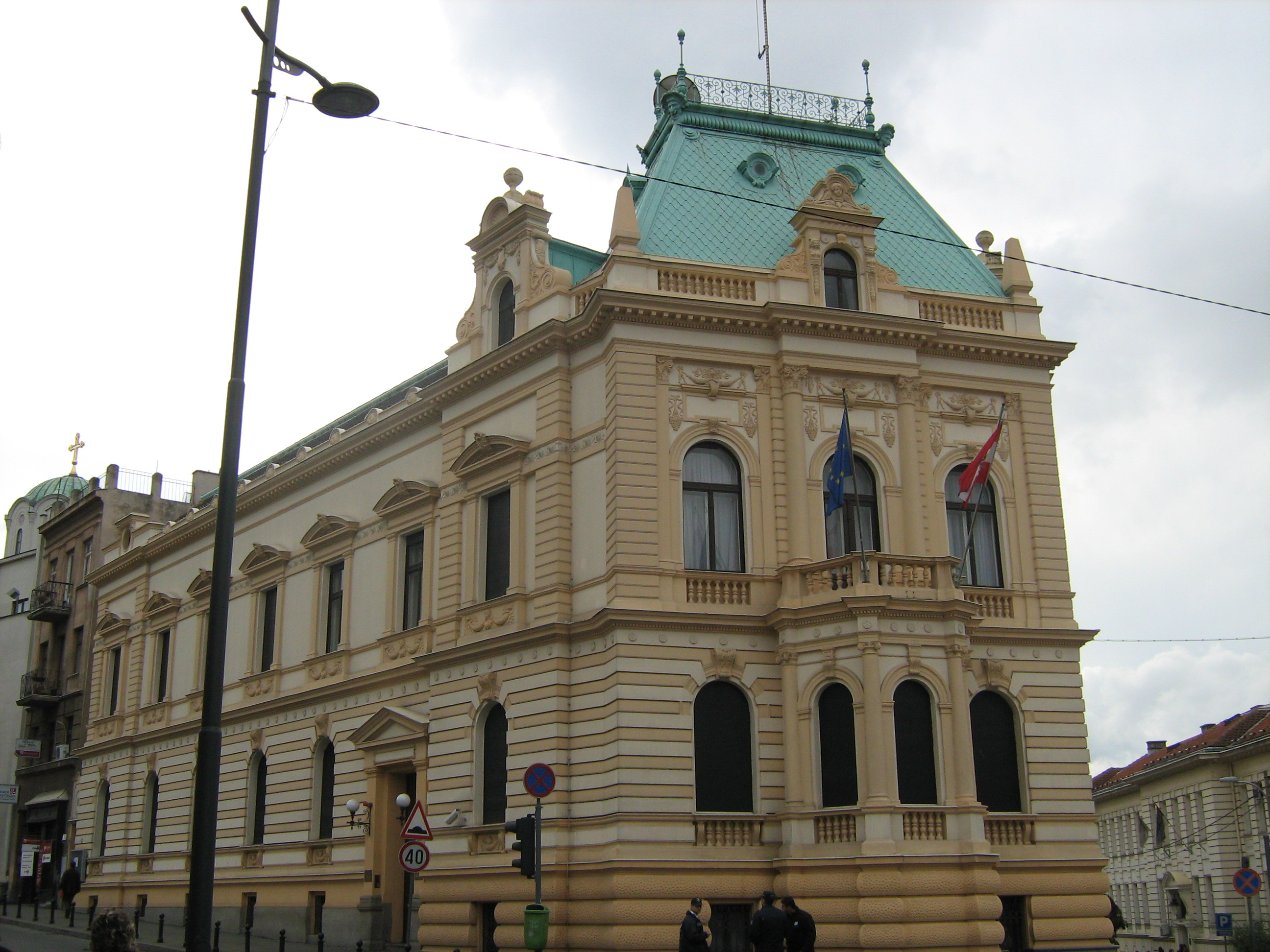 Кнеза Симе Марковића 2, Београд